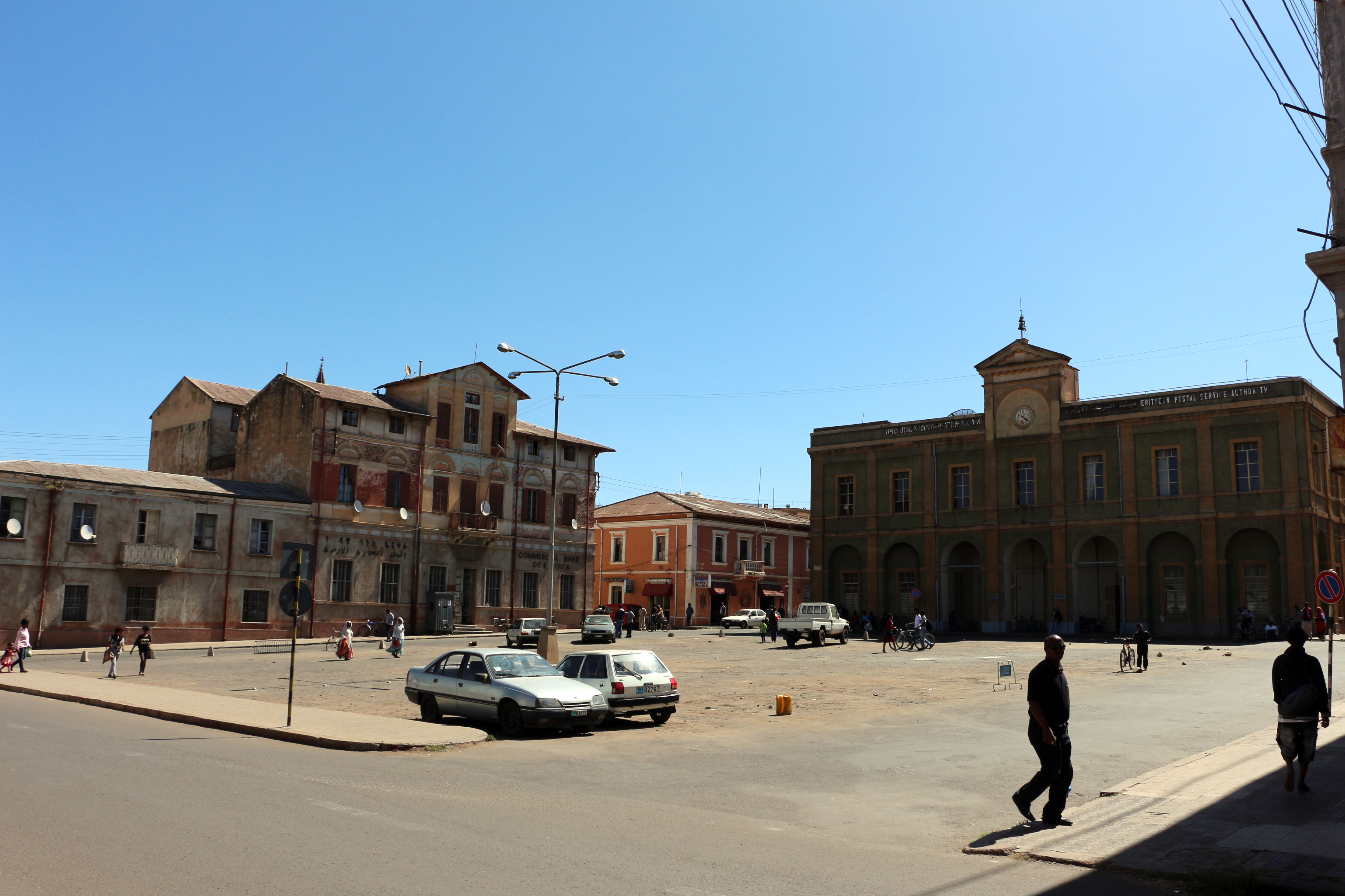 Asmara, banca commerciale dell'eritrea e ufficio postale.JPG